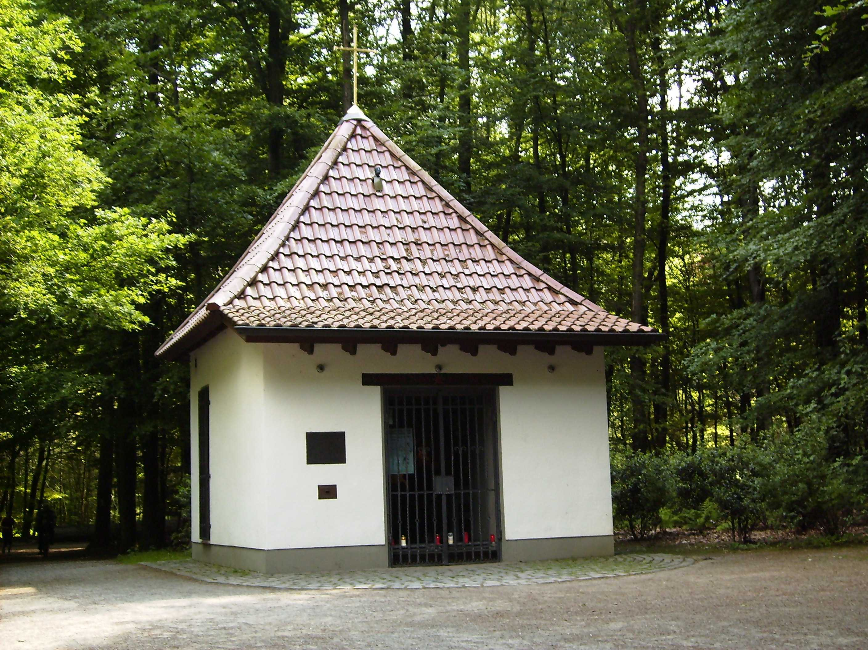 Sieben-Schmerzen-Kapelle in der Löchterheide (Westerholter Wald) in Gelsenkirchen-Buer an der Stadtgrenze nach Herten-Westerholt. 1723 von Henrika Johanna Christine Mathild von Aschenbroich zu Schonebeck als Sühnekapelle errichtet. Seither von den Mitgliedern der katholischen Pfarrgemeinden in Buer und Westerholt als Gottesdienst- und Andachtsstätte genutzt und erhalten.